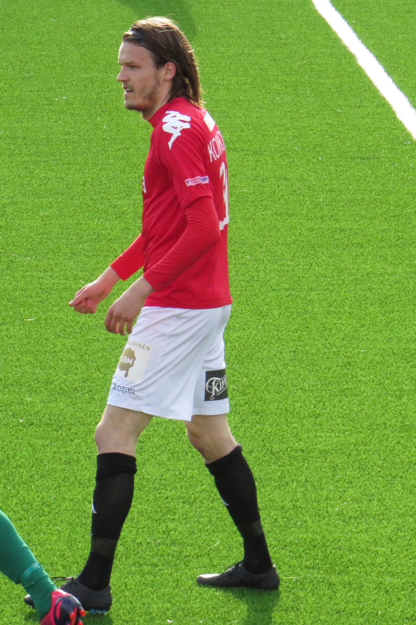 Joni Korhonen, suomalainen jalkapalloilija HIFK:n joukkueessa kaudella 2015.